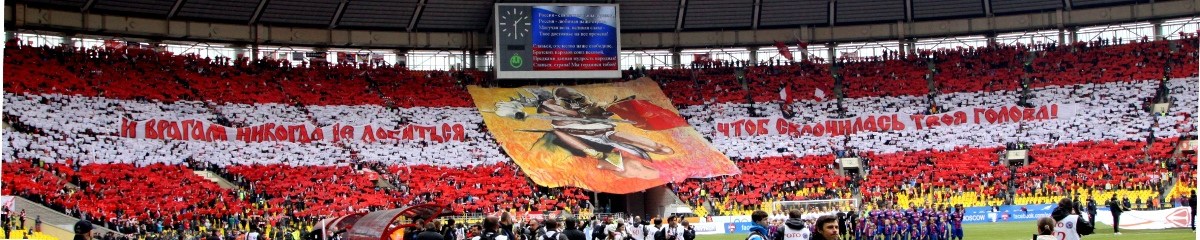 Перфоманс на матче ЦСКА-Спартак. Сезон 2013 года